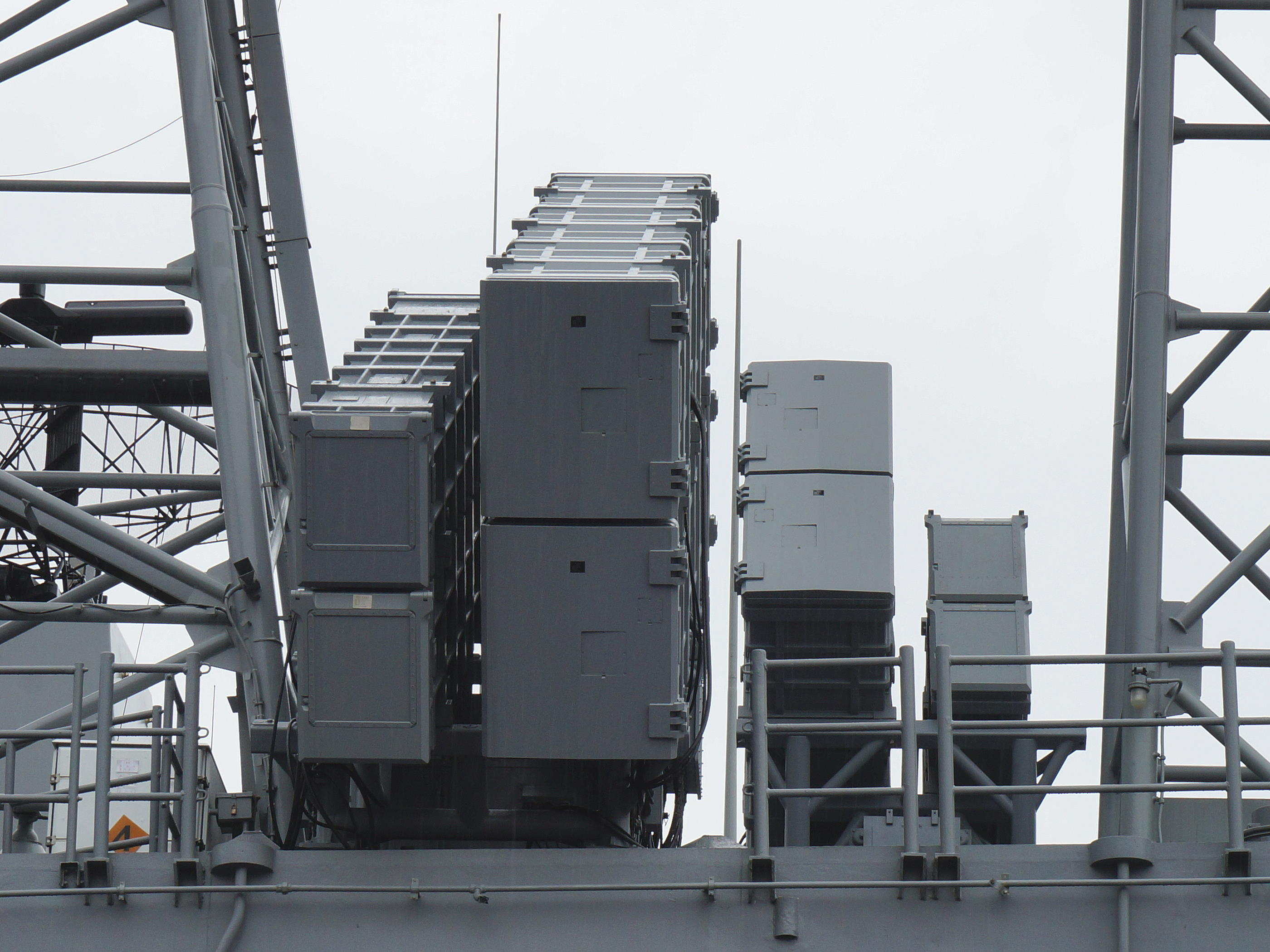 中華民國海軍108年敦睦遠航訓練支隊訪問基隆，田單軍艦甲板中部的雄風二型與雄風三型反艦飛彈發射箱。